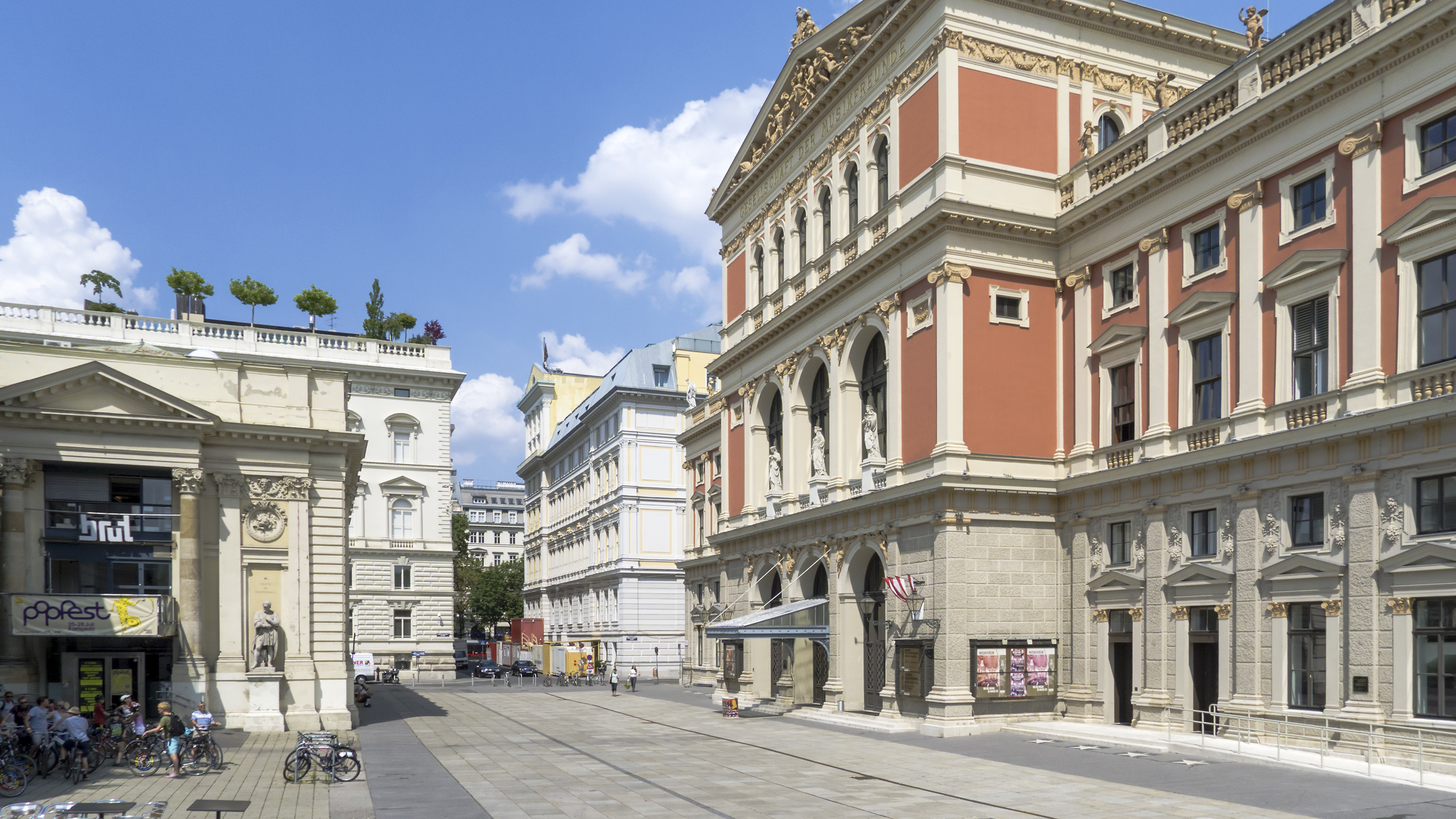 Musikvereinsplatz in Wien 1 beim Karlsplatz Richtung Nordosten